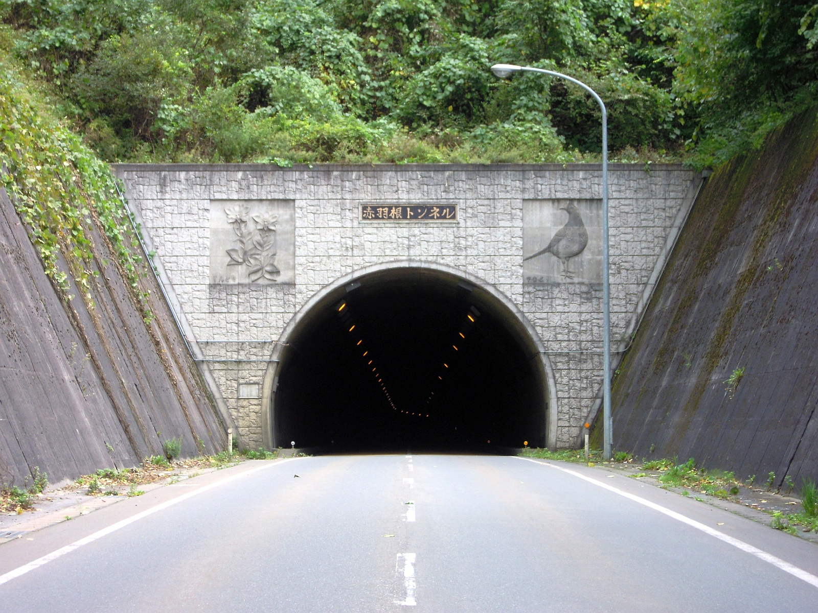 岩手県気仙郡住田町と遠野市との間に跨る国道340号線の赤羽根トンネルの遠野市側坑口。坑口の左右にあるレリーフは、遠野市の花であるリンドウ（向かって左側。なお、2005年の合併以前の市の花。合併後はヤマユリ）と遠野市の鳥であるヤマドリ（向かって右側）。住田町側の坑口にも、同様に住田町の花であるアツモリソウと住田町の鳥であるヤマドリがあしらわれている。